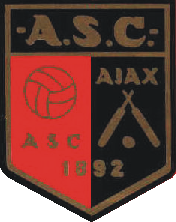 Logo voor de Ajax Sportman Combinatie